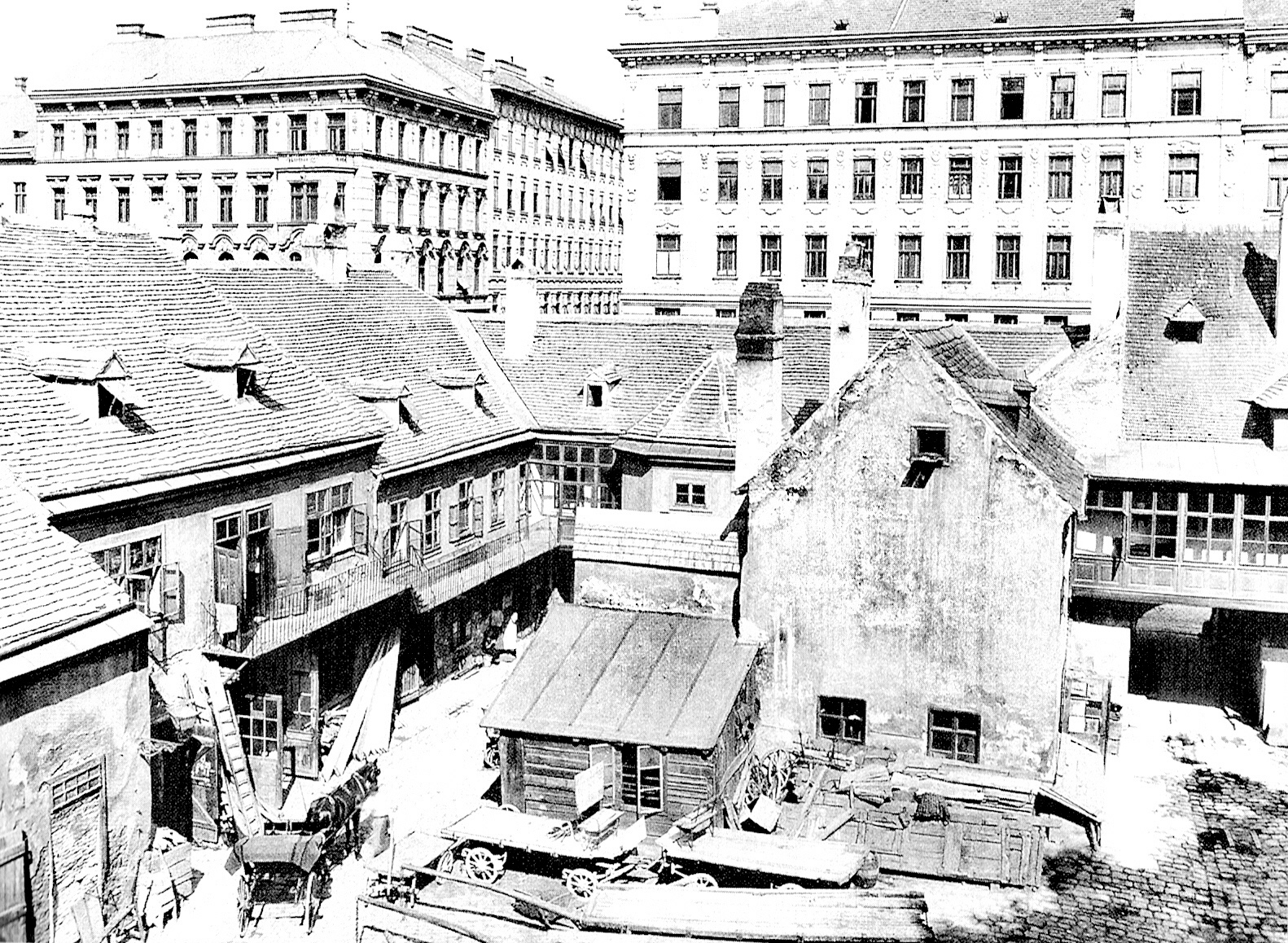 Hinterhof in der Liechtensteinstraße 117, Wien-Alsergrund (IX.)